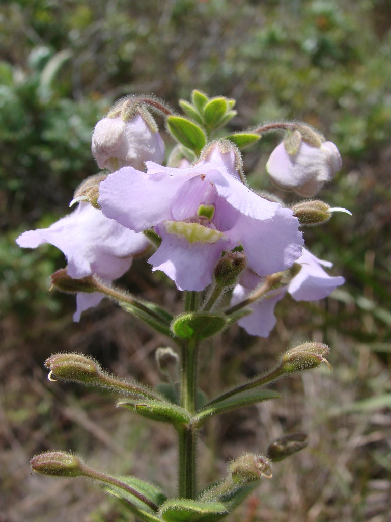 Angelonia verticillata Philcox - PLANTAGINACEAE - Parque Nacional da Chapada Diamantina - Palmeiras - Bahia - Brasil.